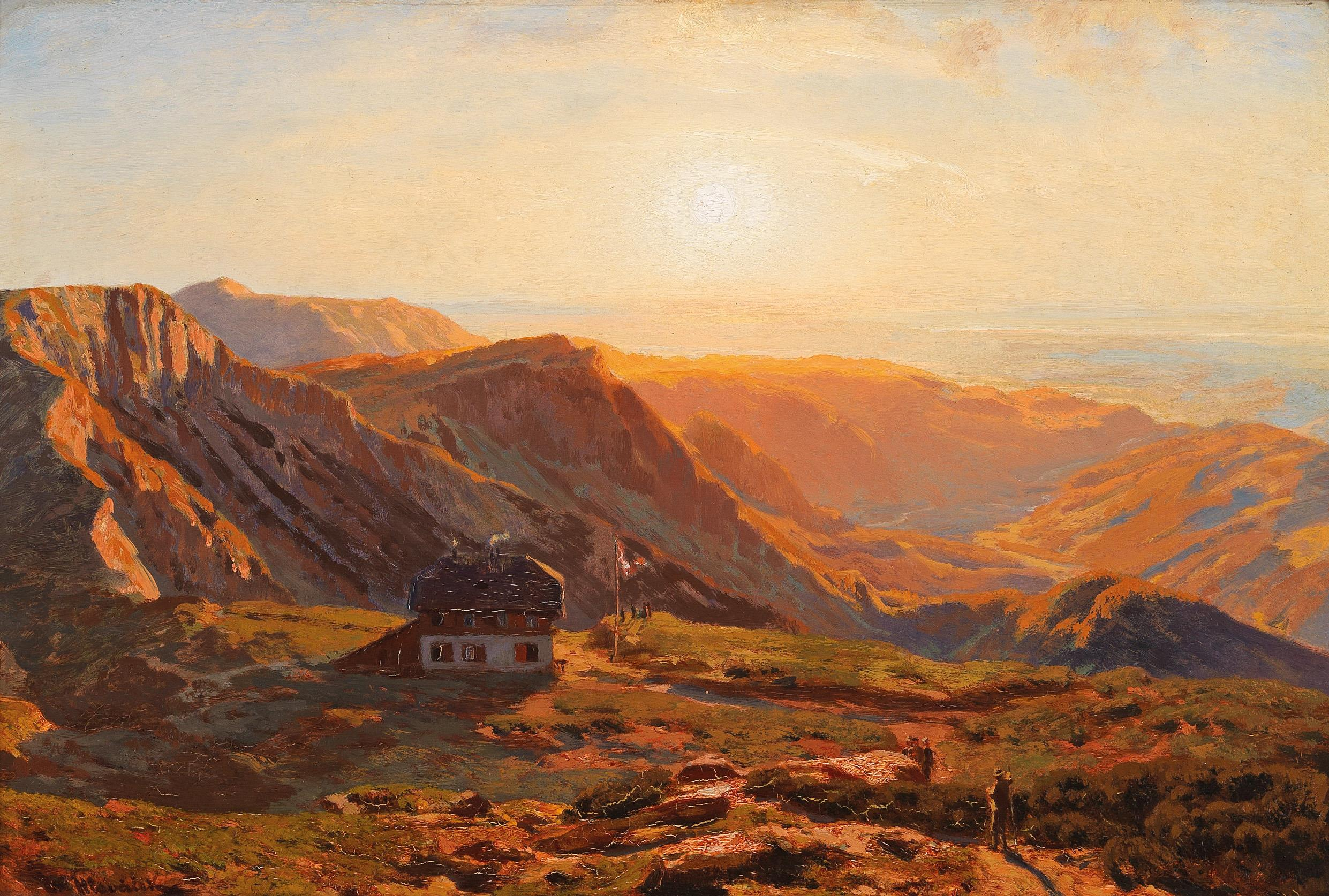 Blick auf das Karl-Ludwig-Haus auf der Rax, signiert Hlavacek, rückseitig eigenhändig bezeichnet, datiert ... beim Carl Ludwig Schutzthaus den ...(18)76 auf der Rax, Öl auf Karton, 32,5 x 47,5 cm